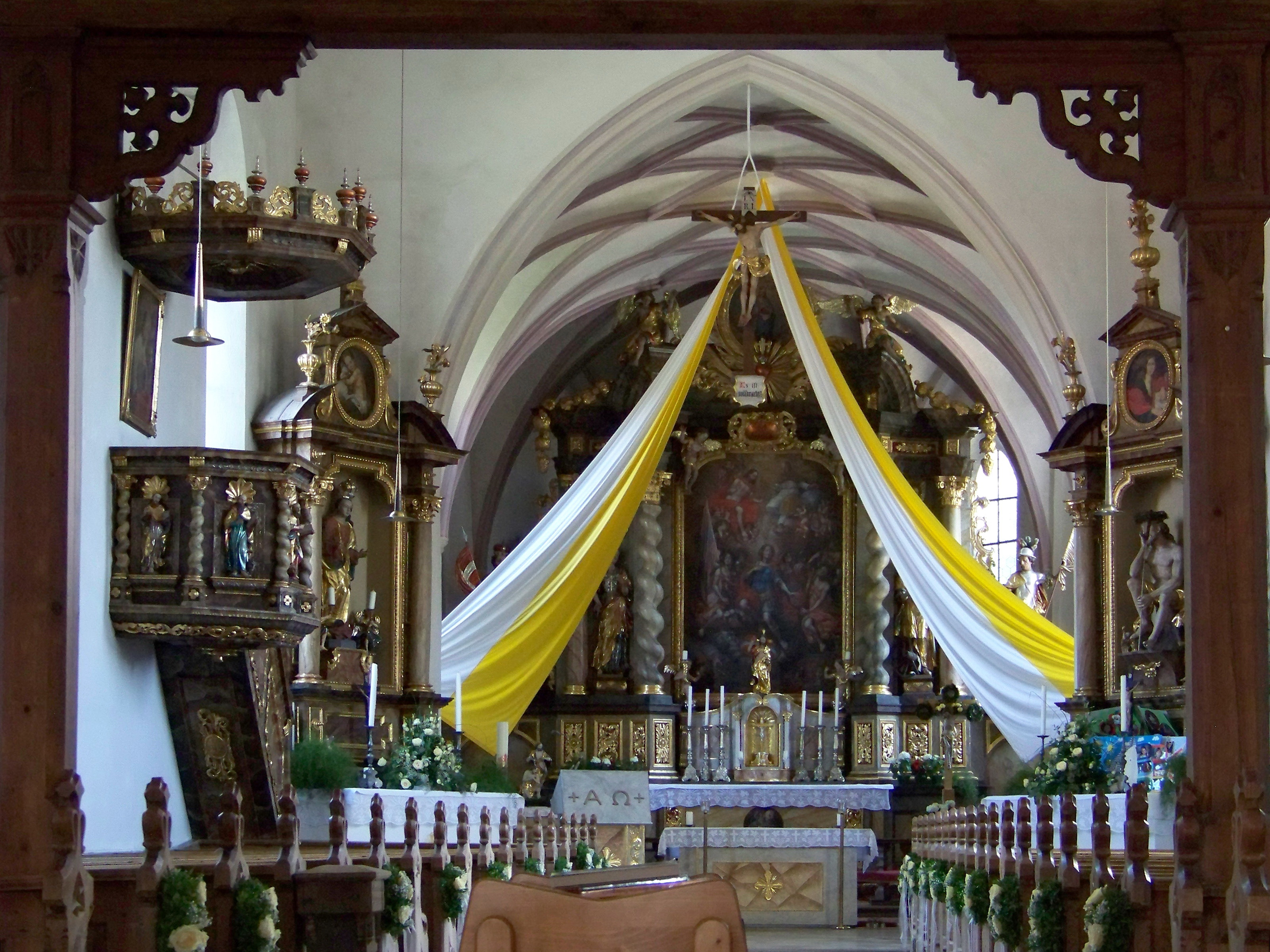 Altdorf bei Landshut. Eugenbach, Kichweg 21. Katholische Pfarrkirche St. Georg. Saalbau aus dem 10. Jahrhundert, westliche Erweiterung 13./14. Jahrhundert, spätgotischer Chor mit Netzgewölbe 1516/17 (dendrochronologisch datiert). Vierachsiges Schiff, Chor mit drei Jochen. Hochaltar Rokoko um 1750. Seitenaltäre und Kanzel barock um 1700.